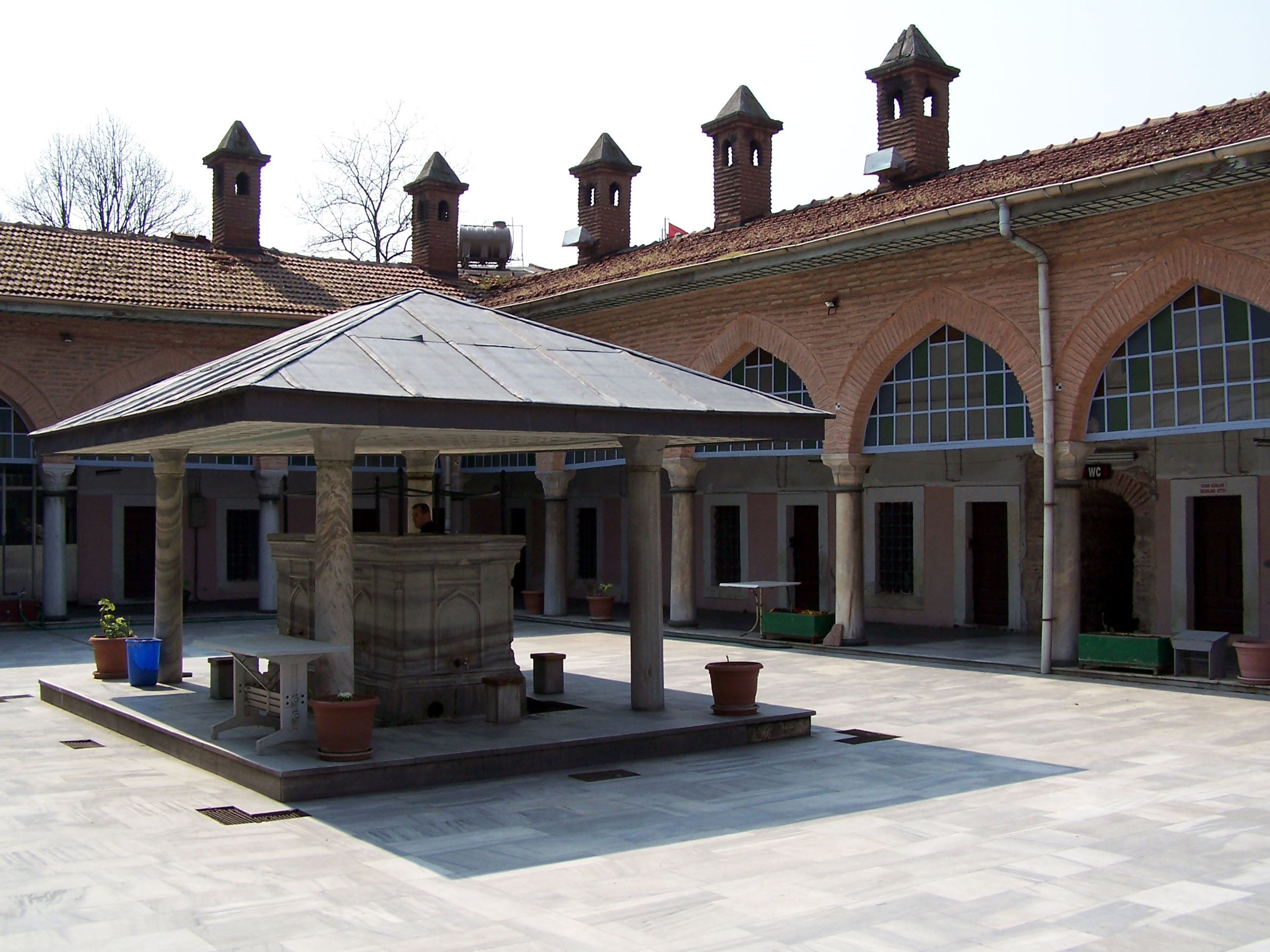 Şadırvan of Sinan Paşa Camii in Beşiktaş, İstanbul, Turkey